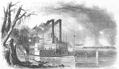 Civil War Hospital Boat Henry von Phul, Gibson and Gibson's Dictionary of Transports and Combatant Vessels, Steam and Sail, Employed by the Union Army 1861-1868)